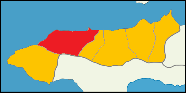 Yalova'da 2014 Türkiye cumhurbaşkanlığı seçimi sonuçları